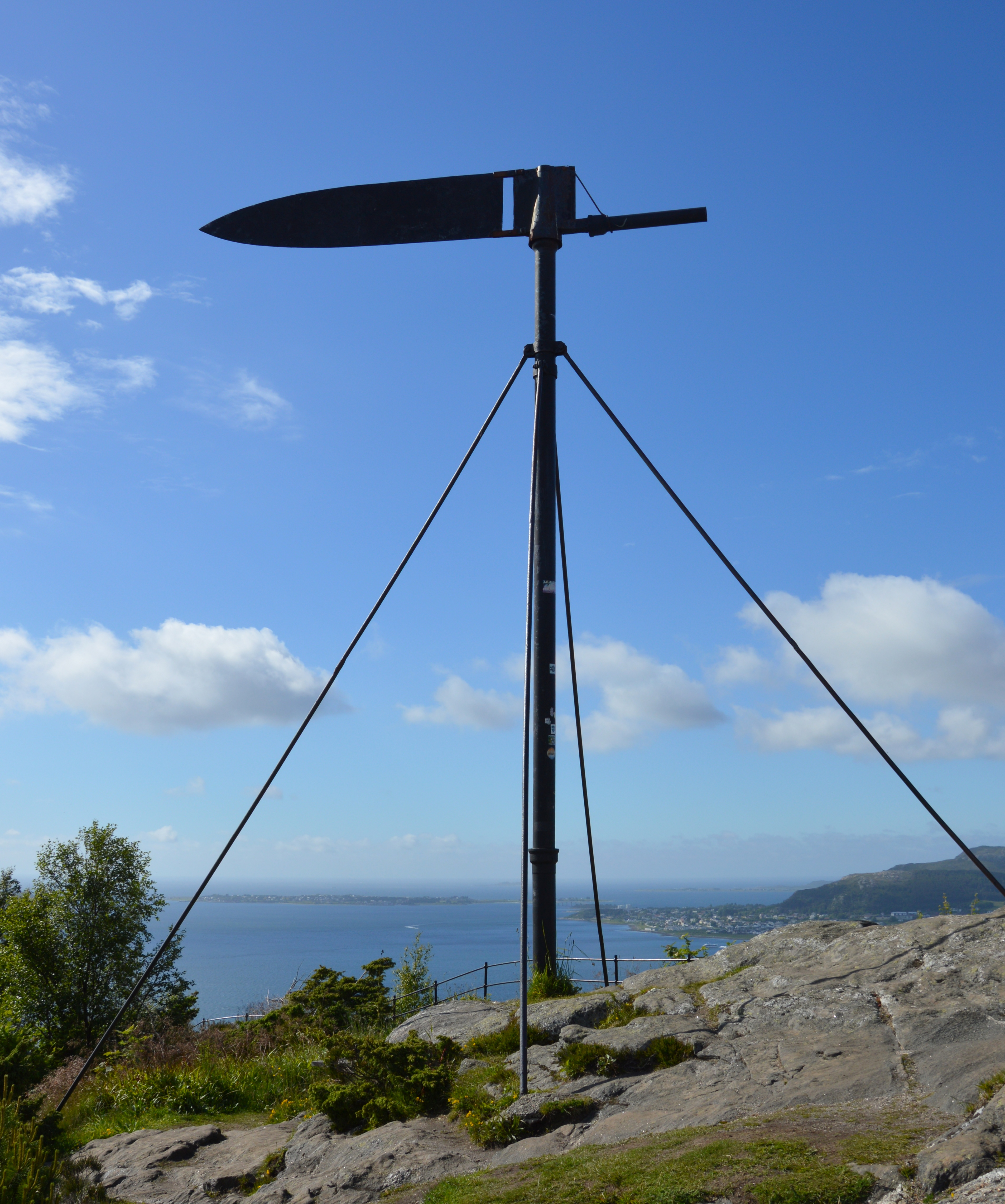 Kniven Alesund